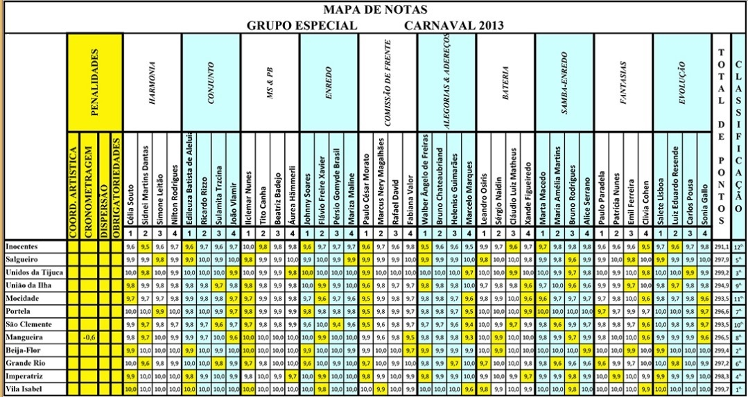 Resultados do Carnaval do Rio - 2013